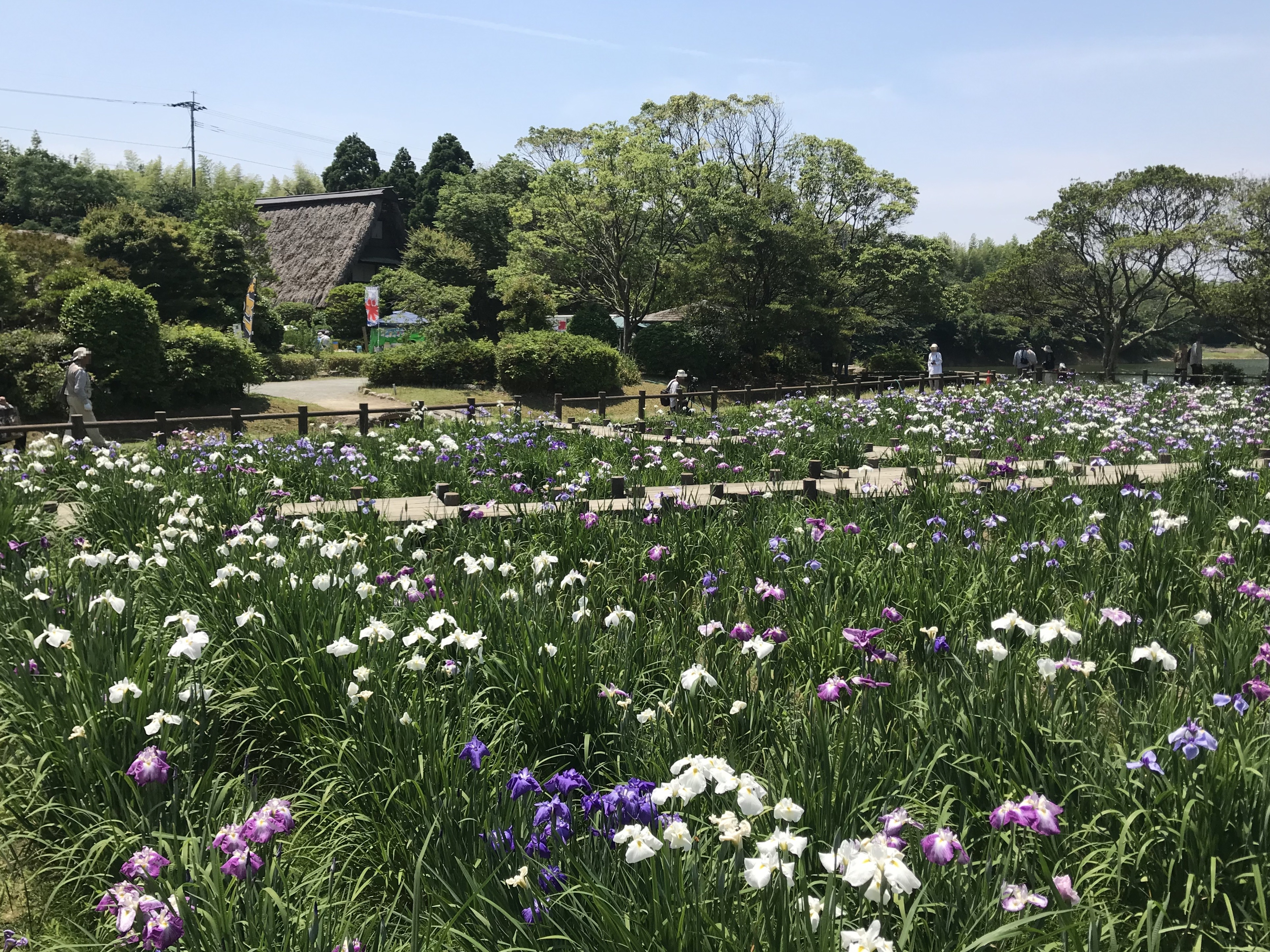 宮地嶽神社の江戸菖蒲苑